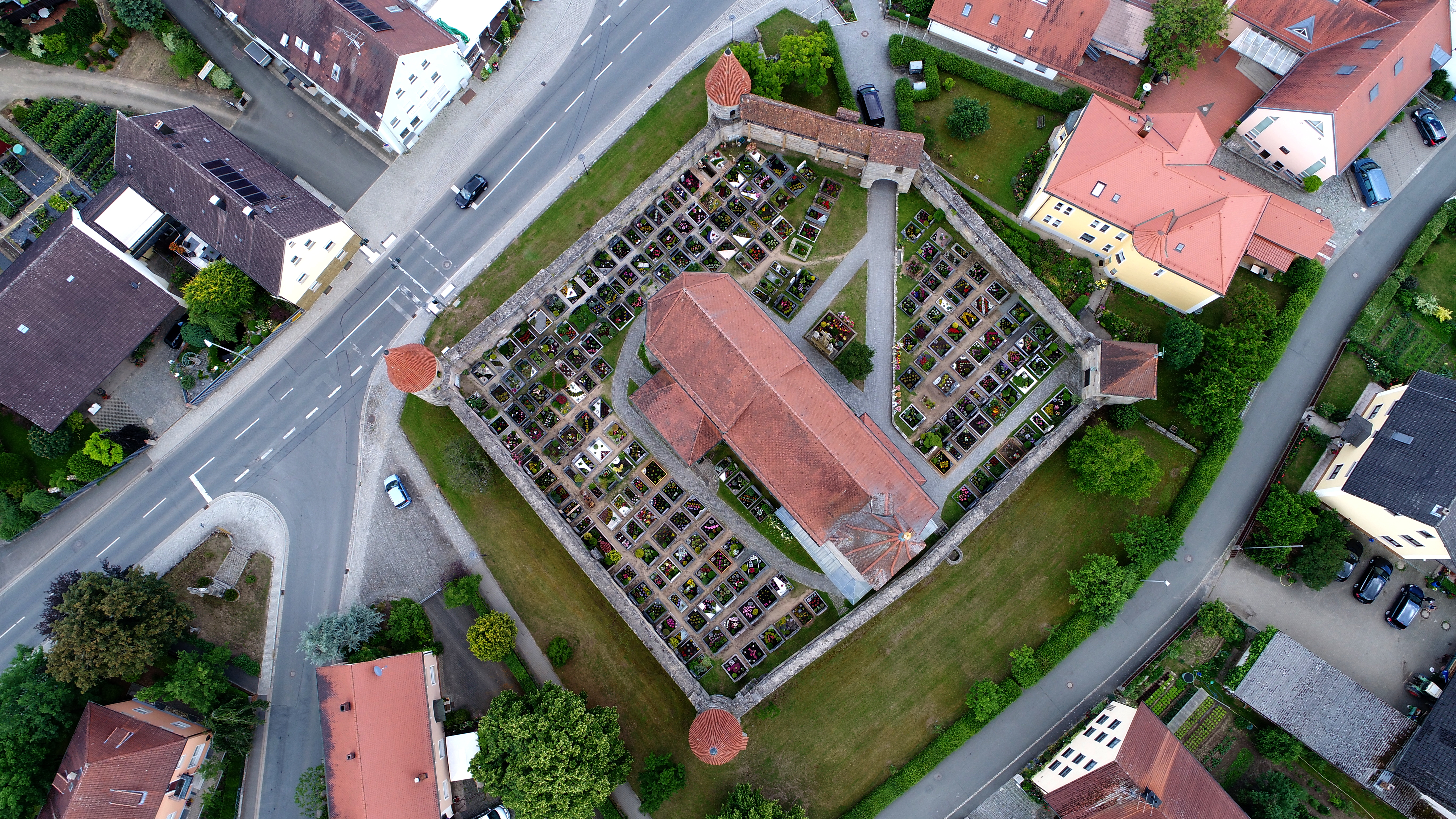 Kirchenburg Effeltrich: Luftaufnahme, Senkrechtansicht (2018)